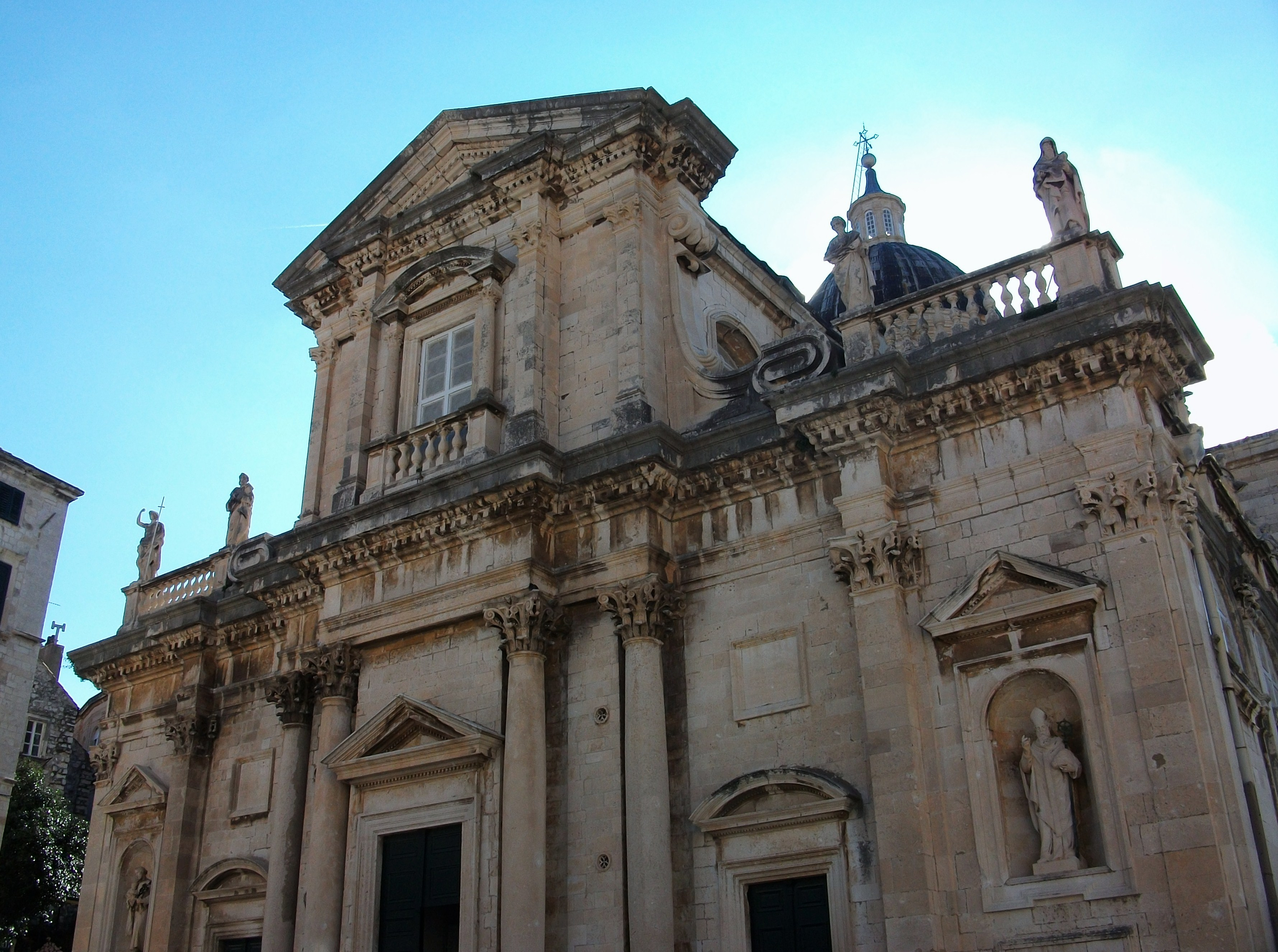 Façana de la catedral de Dubrovnik.